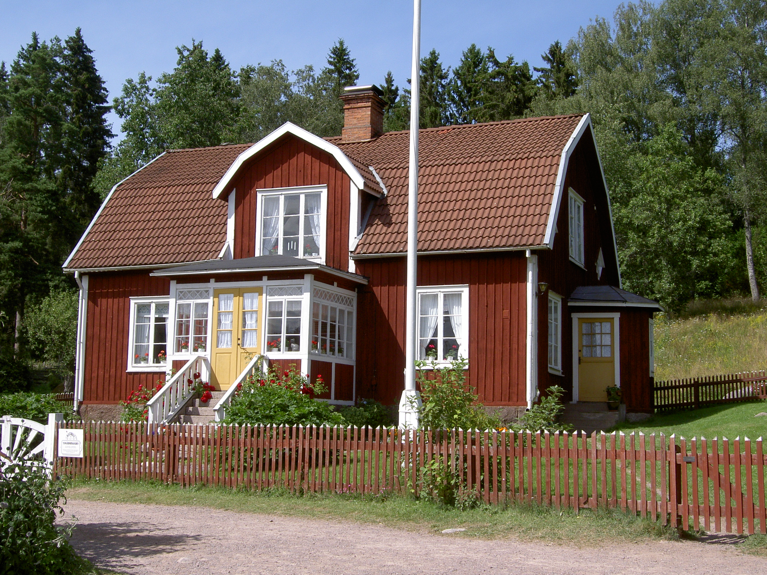 Huvudbyggnaden i Gibberyds gård "Katthult"